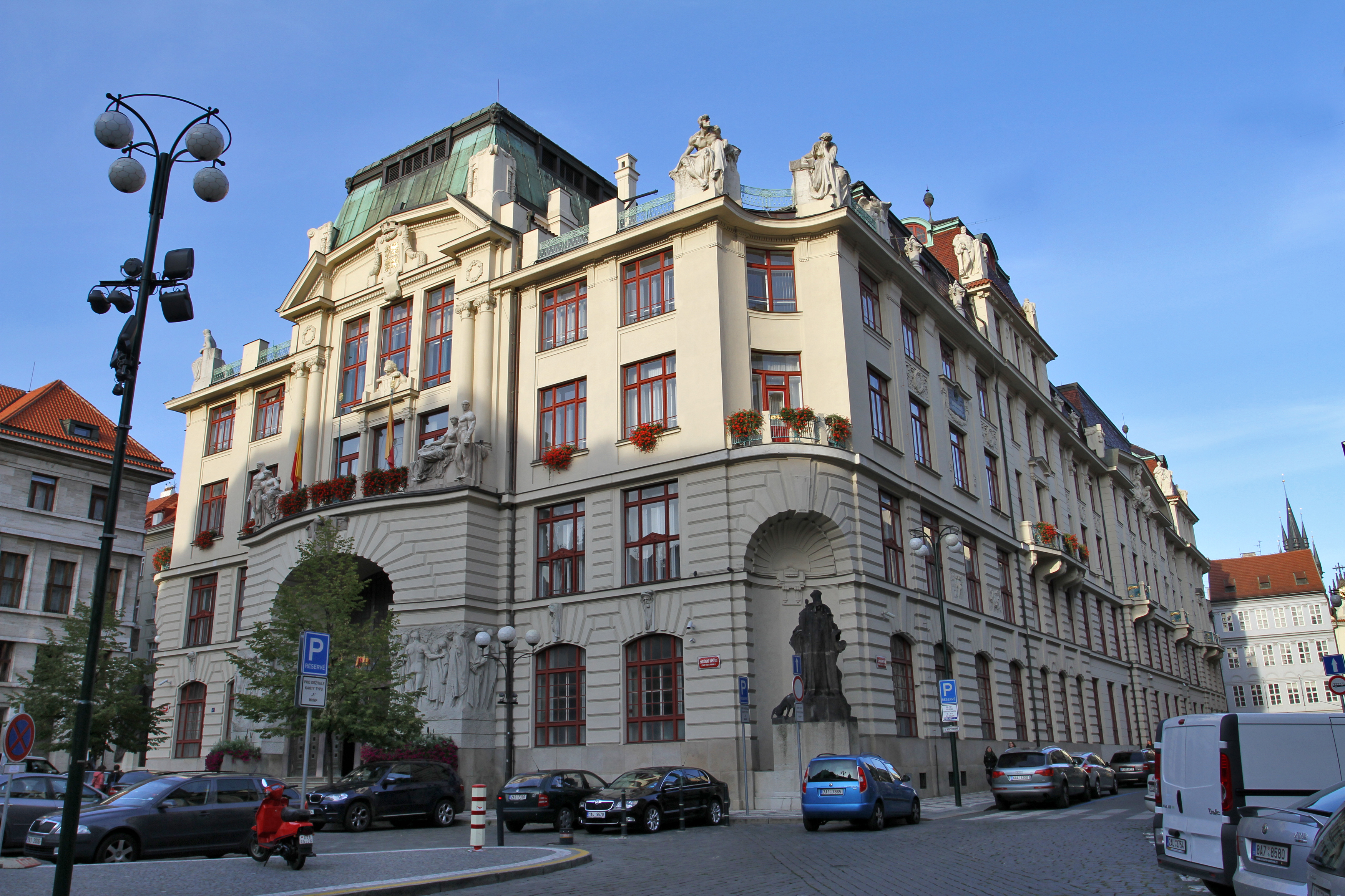 Radnice nová (Staré Město), Praha 1, Mariánské nám. 2, Staré Město